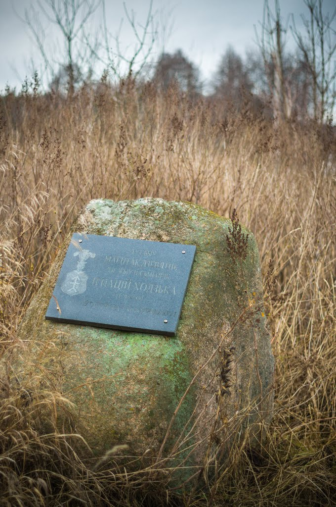 Навасады. Месца маёнтка Дзевятні